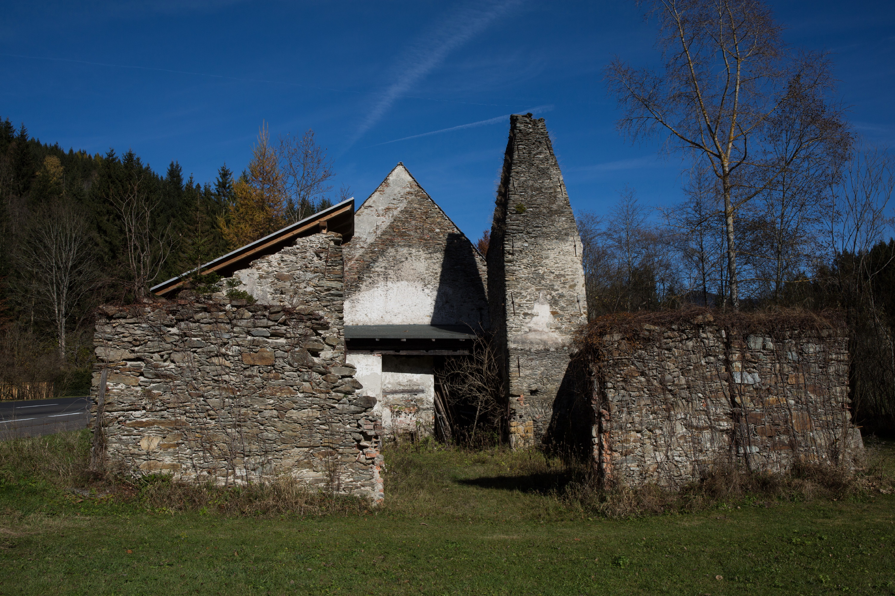 Ehem. Hammerwerk und Mühle